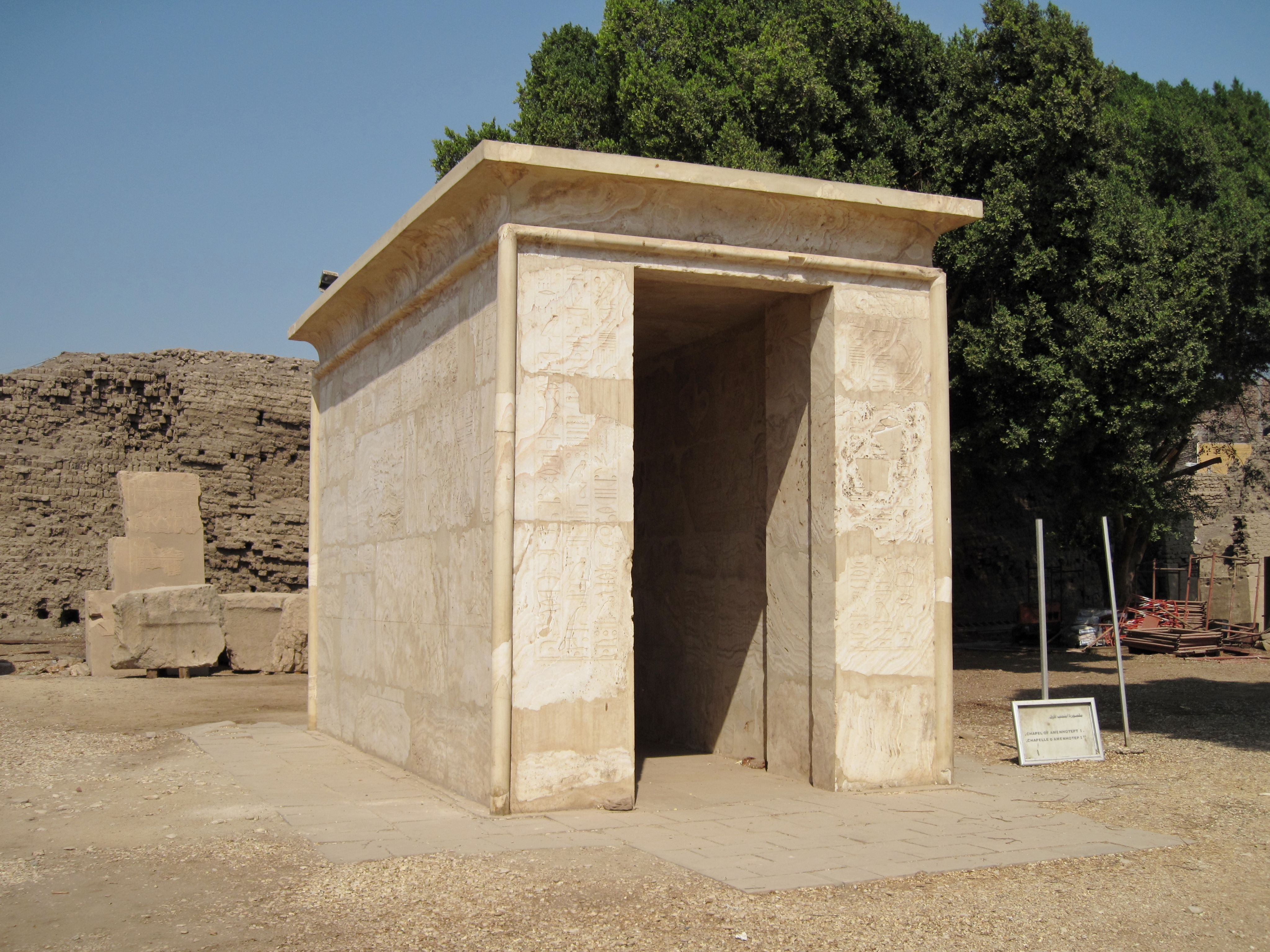 Alabasterkapelle des Amenophis I. im Freilichtmuseum von Karnak, nördlich von Luxor, Ägypten